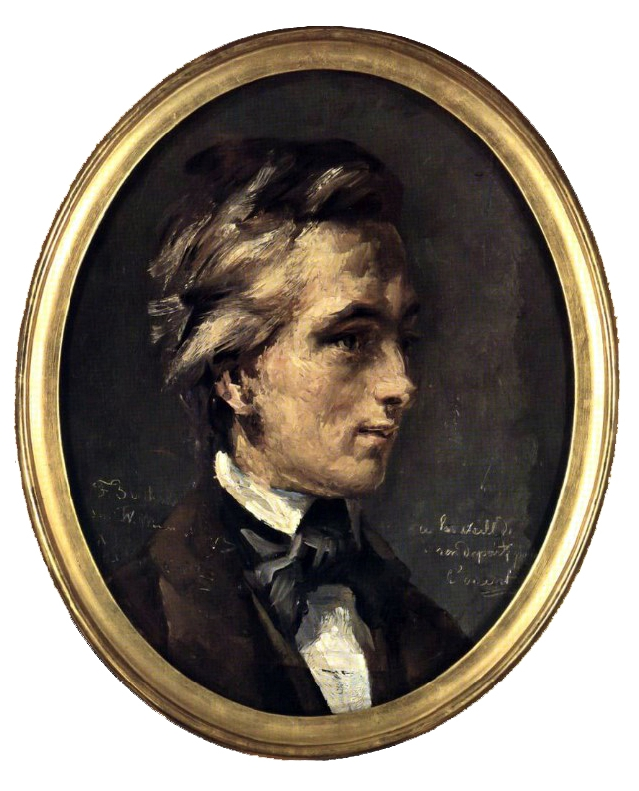 Werner Munzinger (1832–1875) gemalt von Franz Buchser (1852)